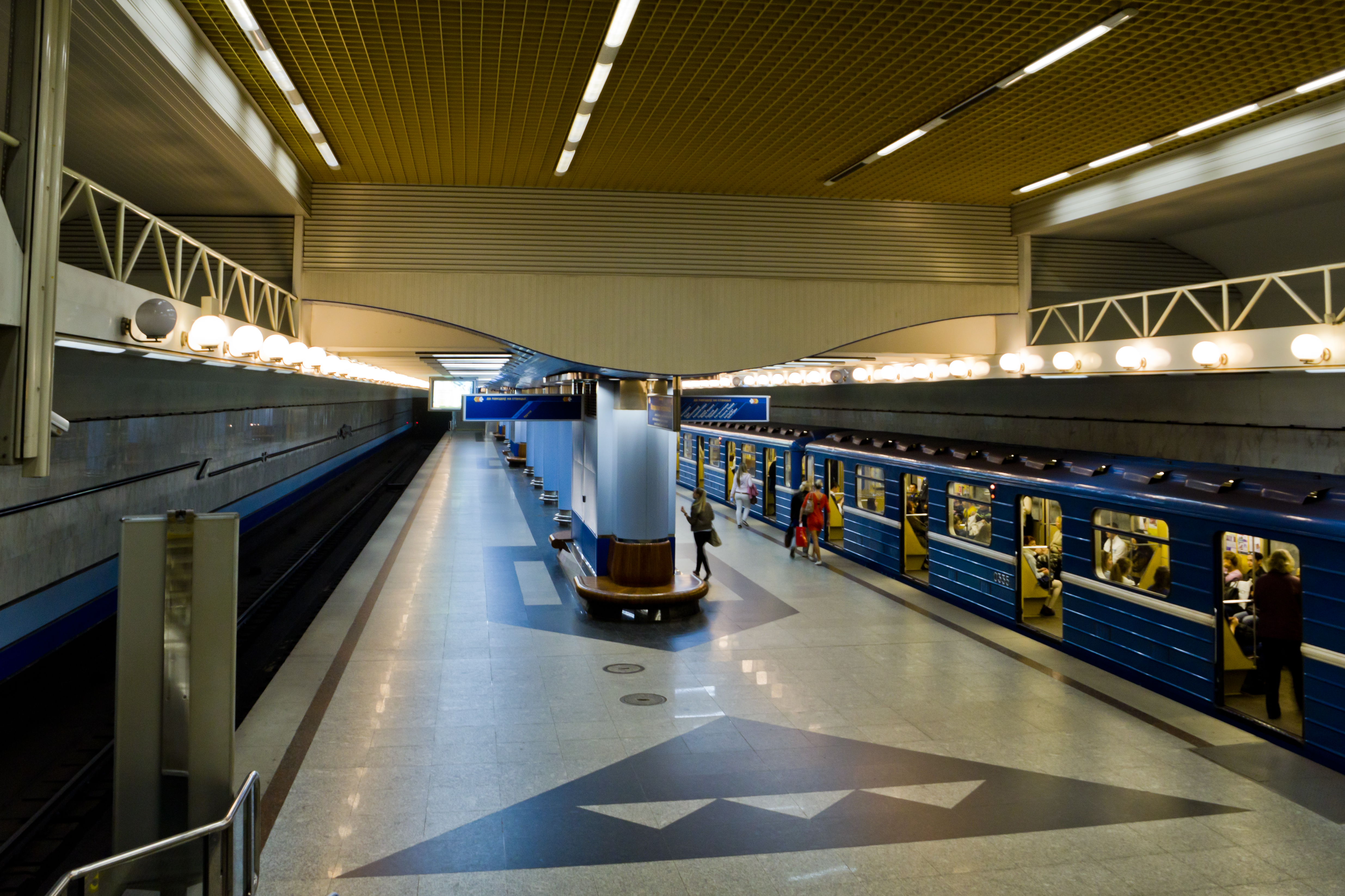 Станция метро «Уручье», Минск